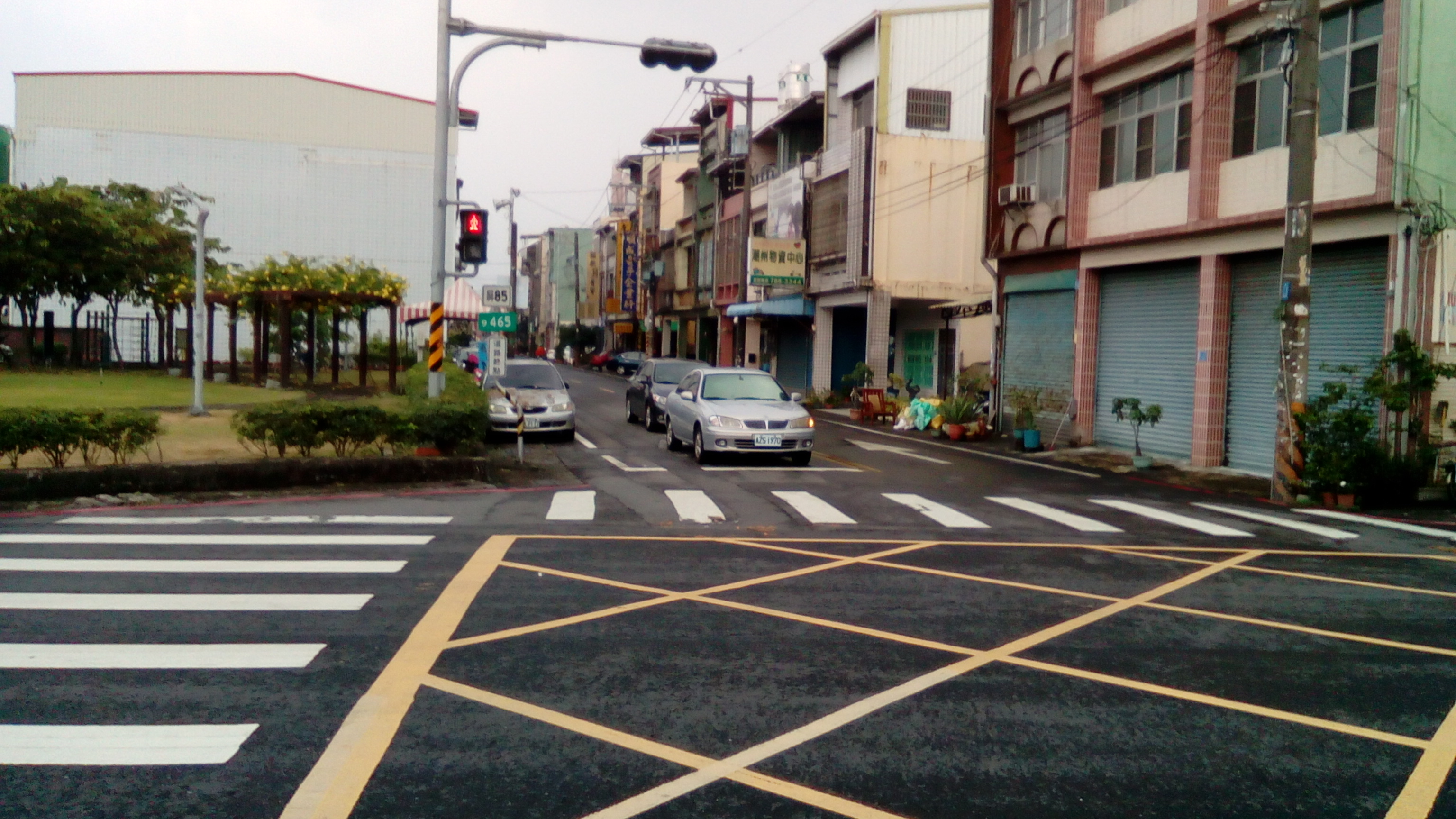 潮州農會超市旁 轉運站前